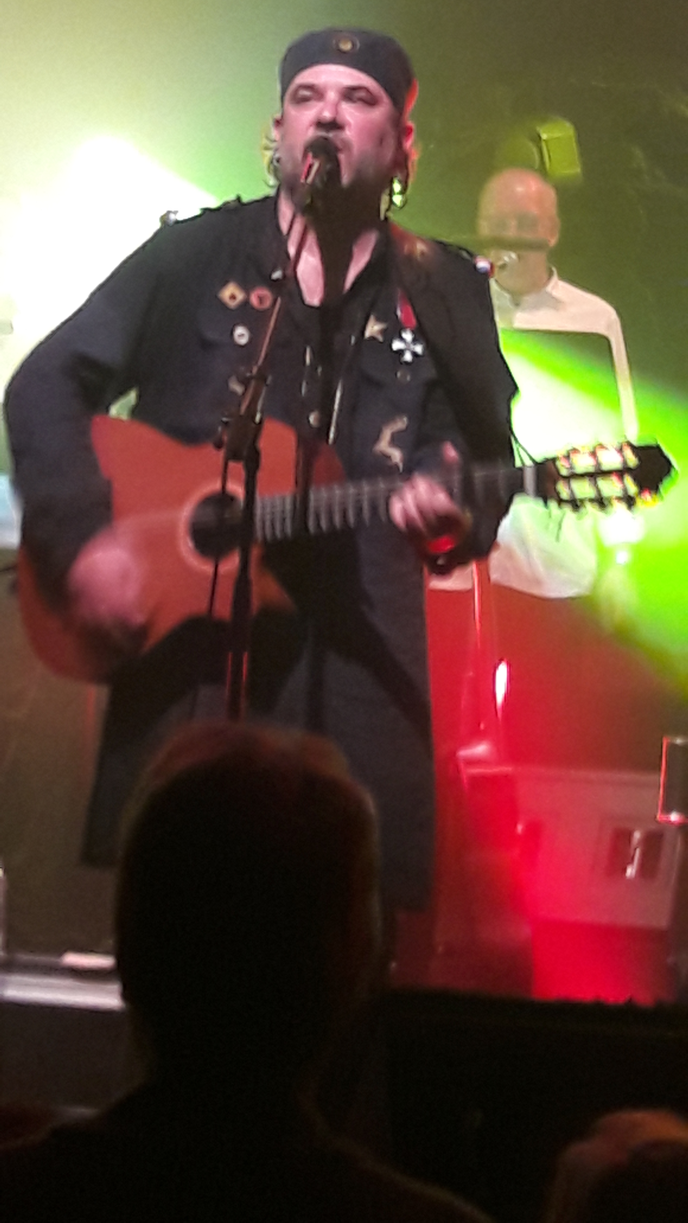 Serge Tonnar & Legotrip bei der CD Release Bommeleeër Buddha